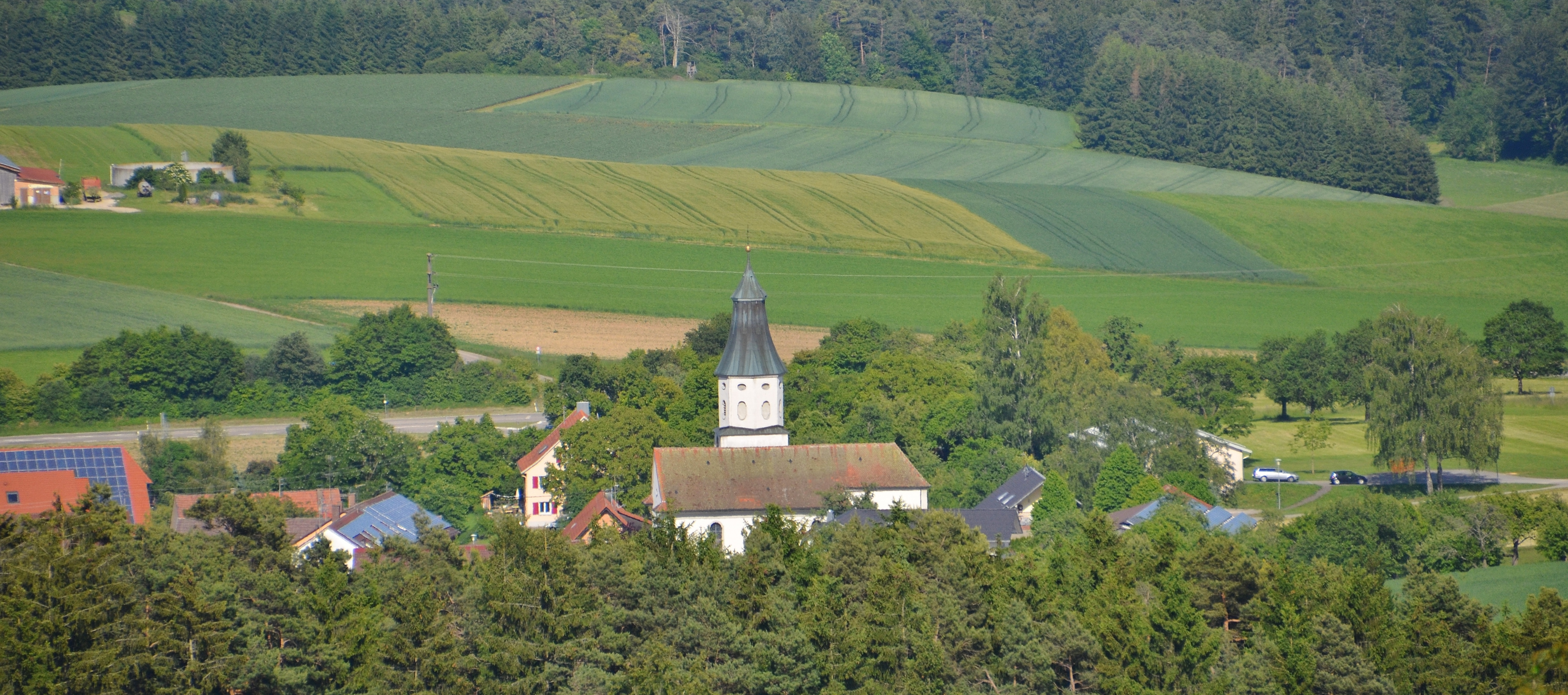 Mauenheim: 973 erstmals urkundlich erwähnt; Immendingen